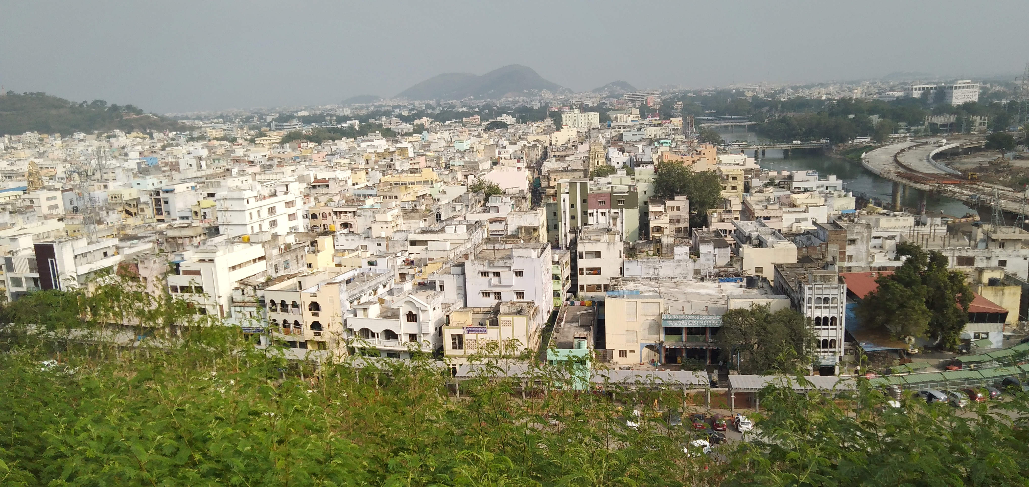 విజయవాడ పట్టణం